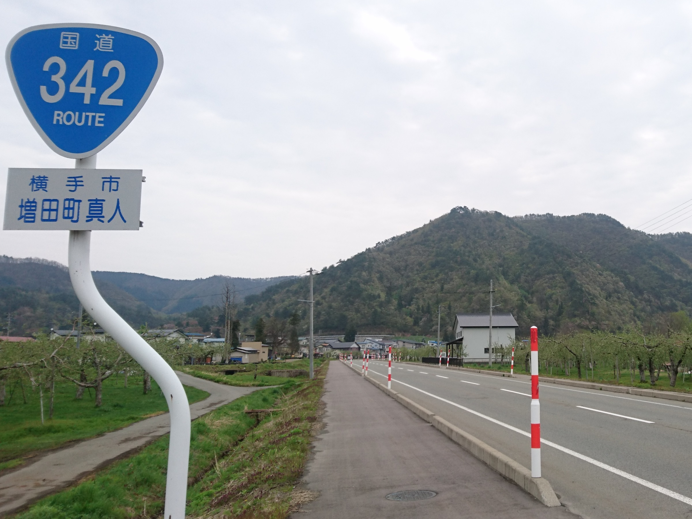 横手市増田町増田付近の国道342号。